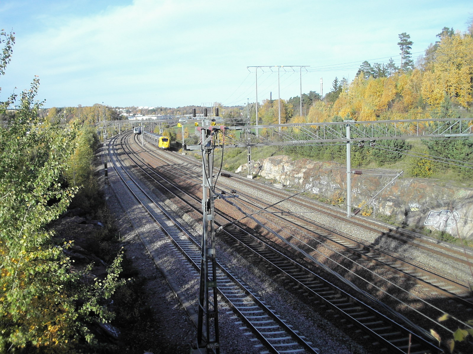 Fyrspår vid Upplands Väsby